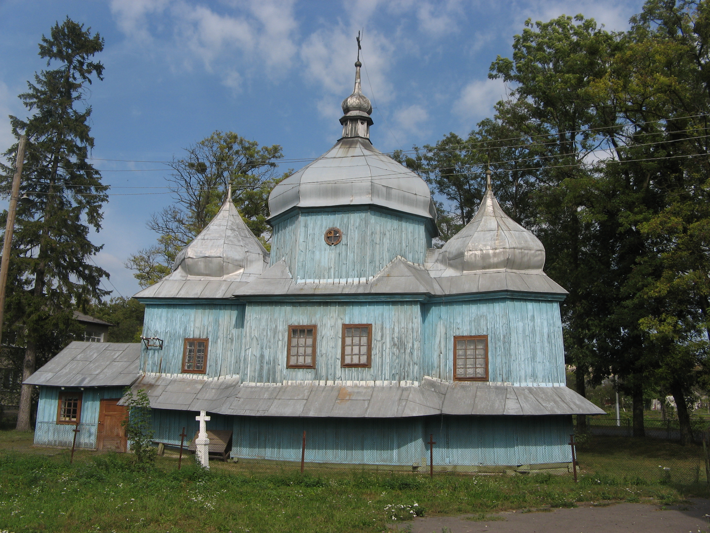 Церква Собору Пресвятої Богородиці (дер.), Заболотці, 1746 р.